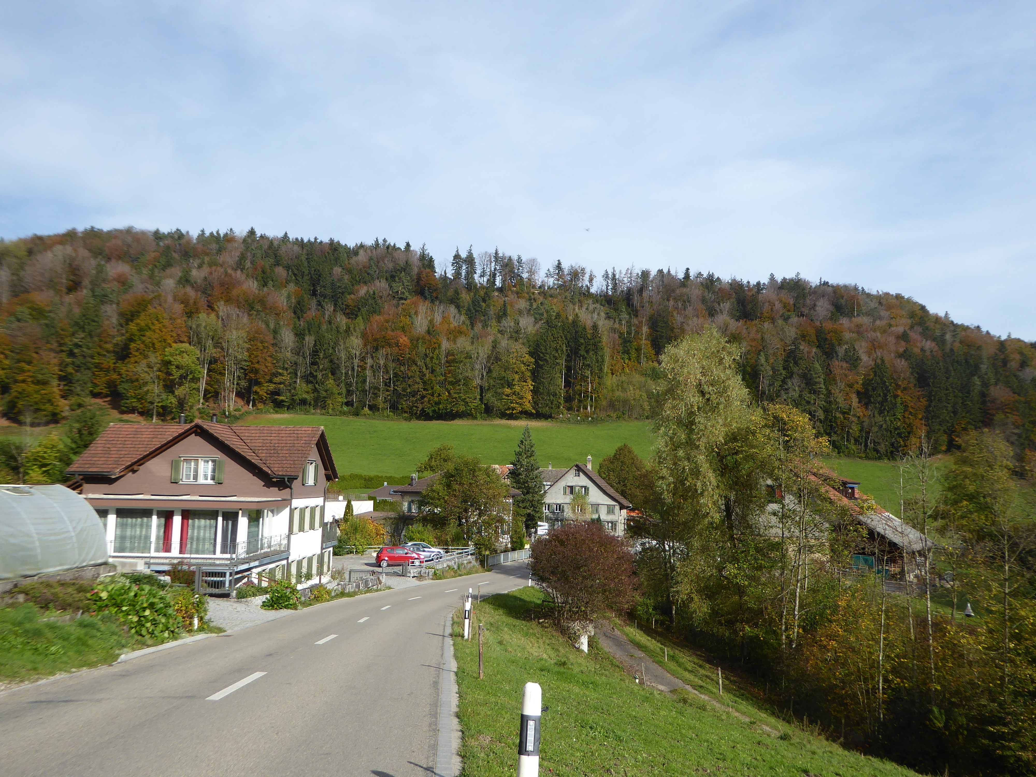 Hatterswil in der früheren Gemeinde Tannegg im Hinterthurgau